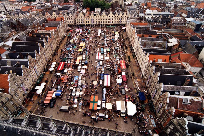 Place des Héros (Petite Place), Arras